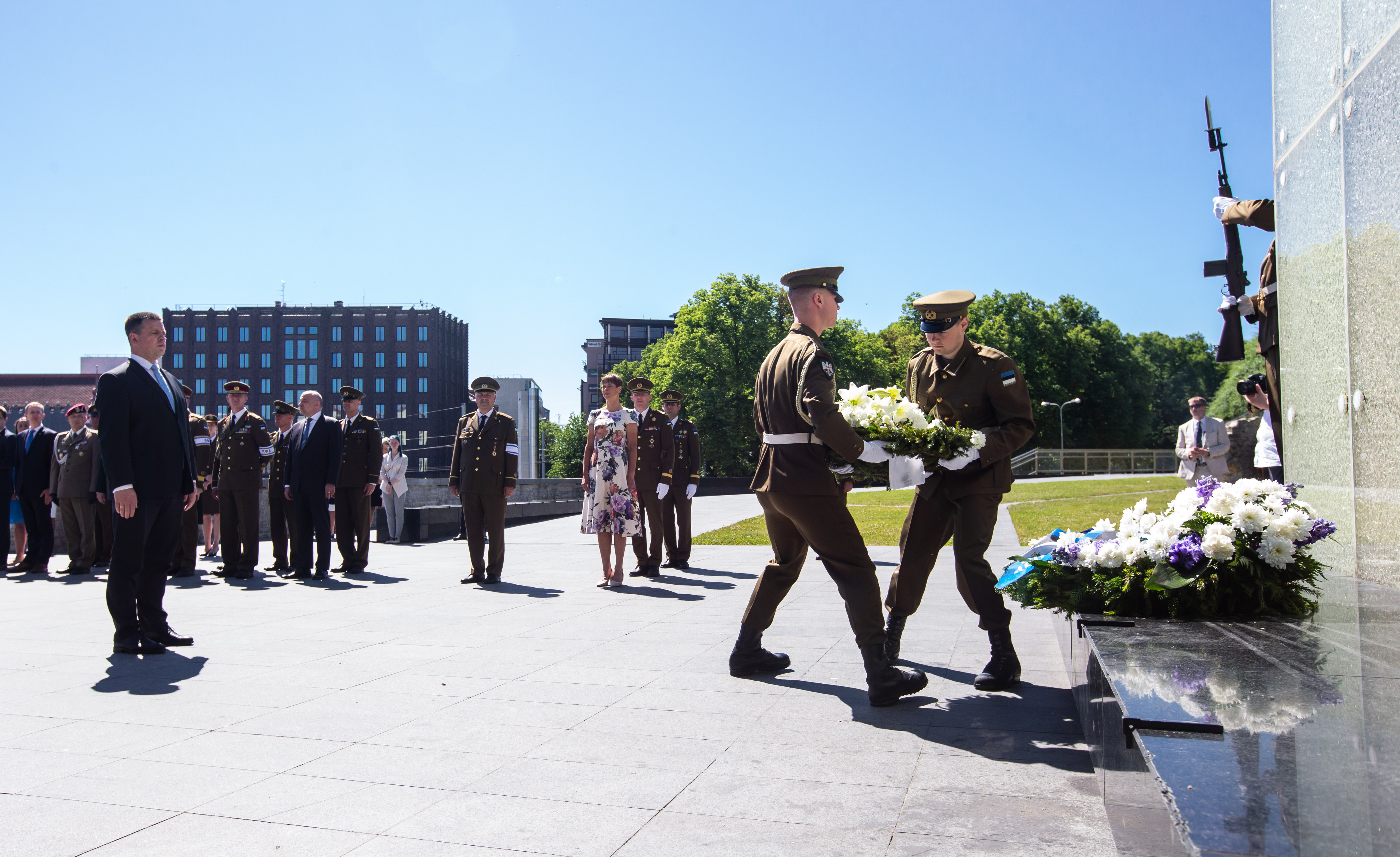 Pärgade asetamise tseremoonia 2020. aasta Võidupühal Tallinnas